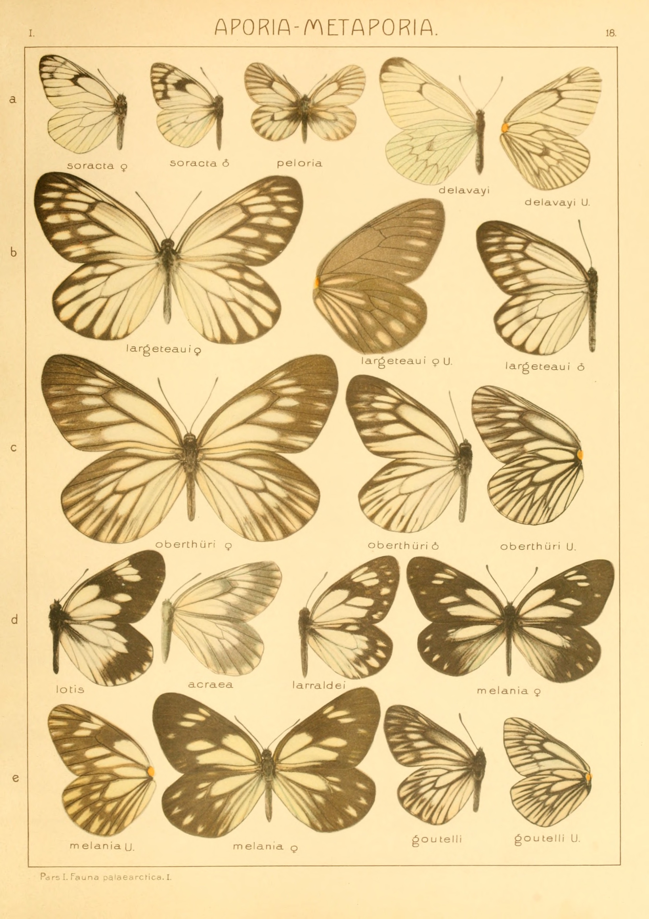 Plate from Seitz, A. Ed., 1900-1909 Die Großschmetterlinge der Erde, Verlag Alfred Kernen, Stuttgart Die Großschmetterlinge des palaearktischen Faunengebietes(The Macrolepidoptera of the world : a systematic account of all the known Macrolepidoptera) Band 1: Abt. 1, Die Großschmetterlinge des palaearktischen Faunengebietes, Die palaearktischen Tagfalter. read text (in German) See The Global Lepidoptera Names Index for valid names